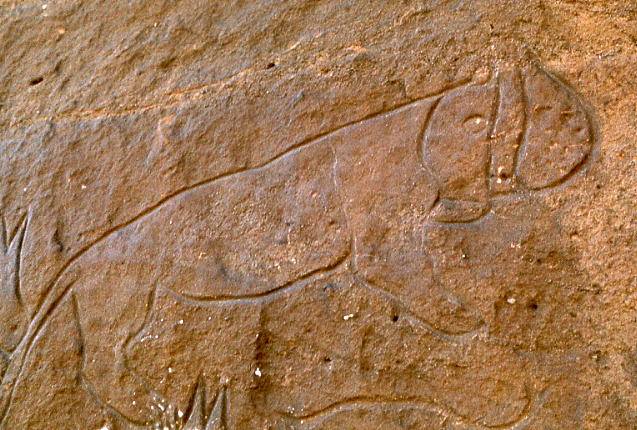 Gravures préhistoriques de la région d'El Bayadh, Algérie